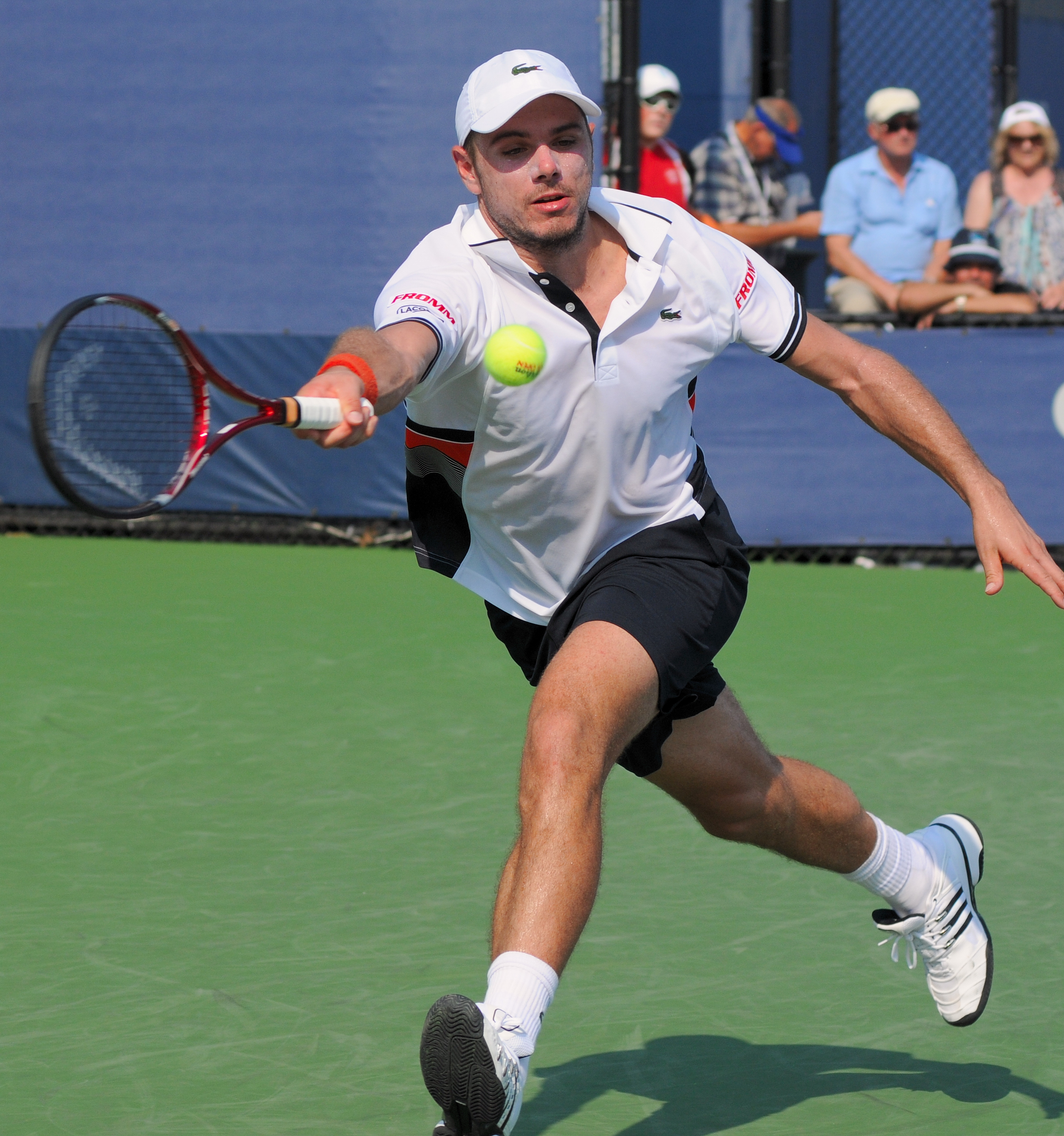 Stanislas Wawrinka - US Open 2010